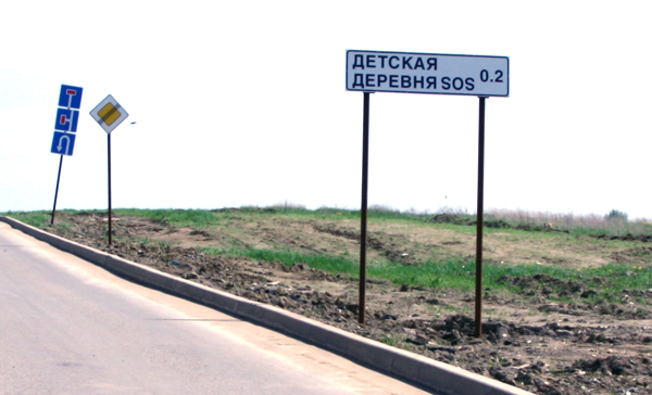 Дорожный указатель по дороге в вологодскую Деревню SOS